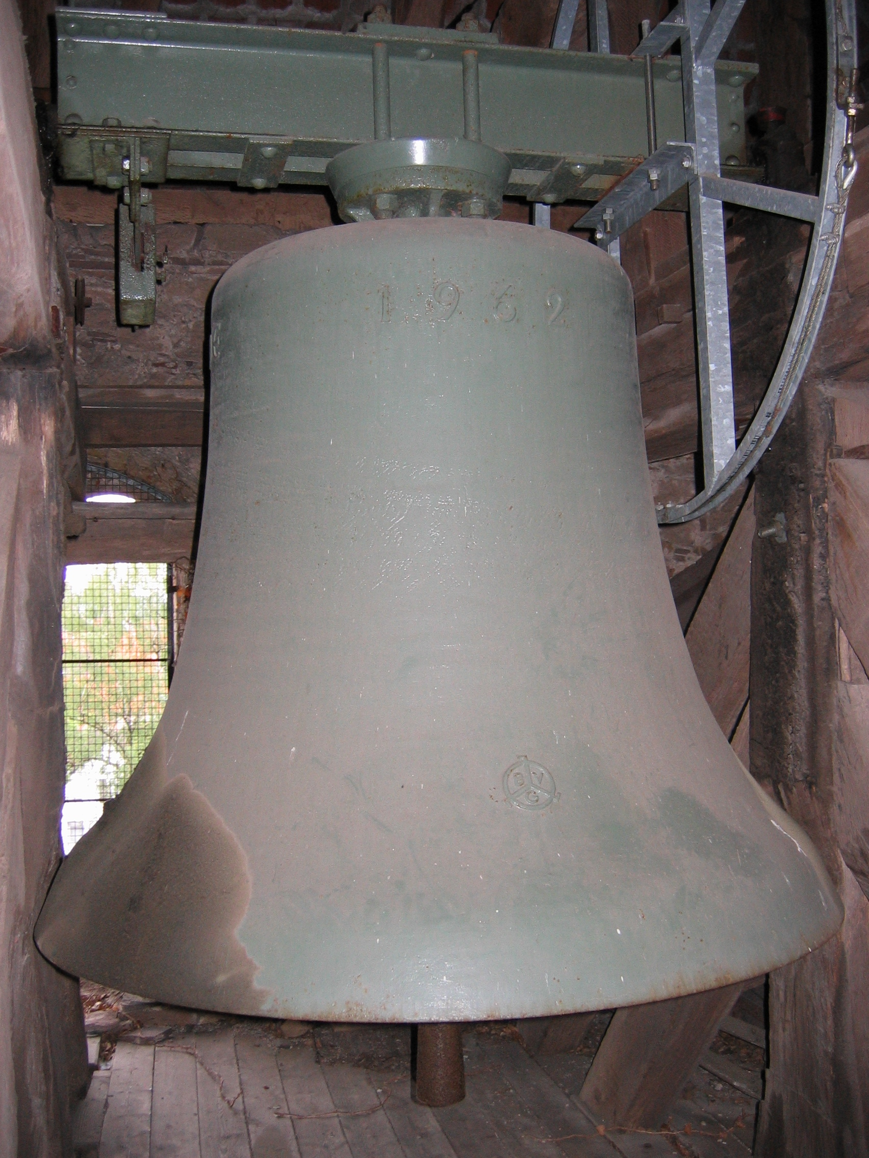 Große (Stahl-)Glocke, d'